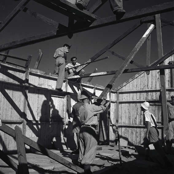 "מכמורת" - העליה למכמורת- קבוצת העובדים התחילה בהקמת הצריף הראשון.